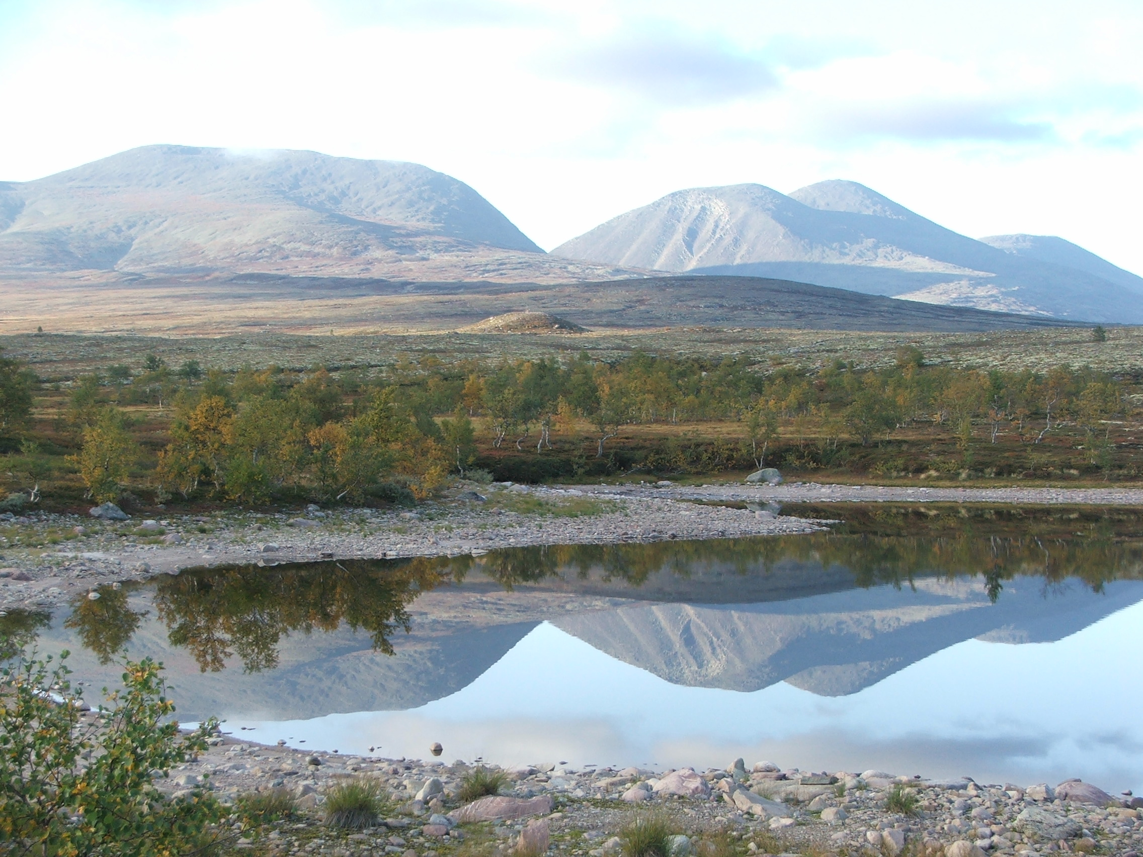 Sølen, fra venstre: Sølen søndre, Sølen midtre (2 topper, den høyre 1755 moh.), Sølen nordre